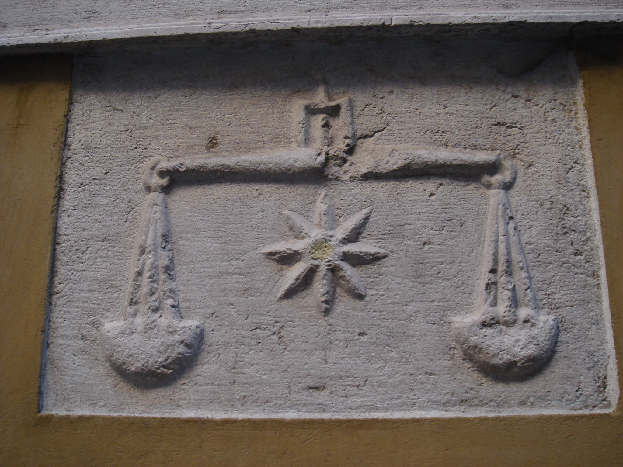 Palazzo delle Mercanzie (Brescia). Bassorilievo che rappresenta la bilancia a due piatti.